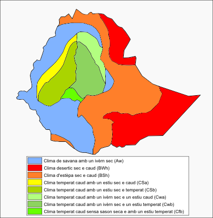 Esquèma generau dau clima d'Etiopia.